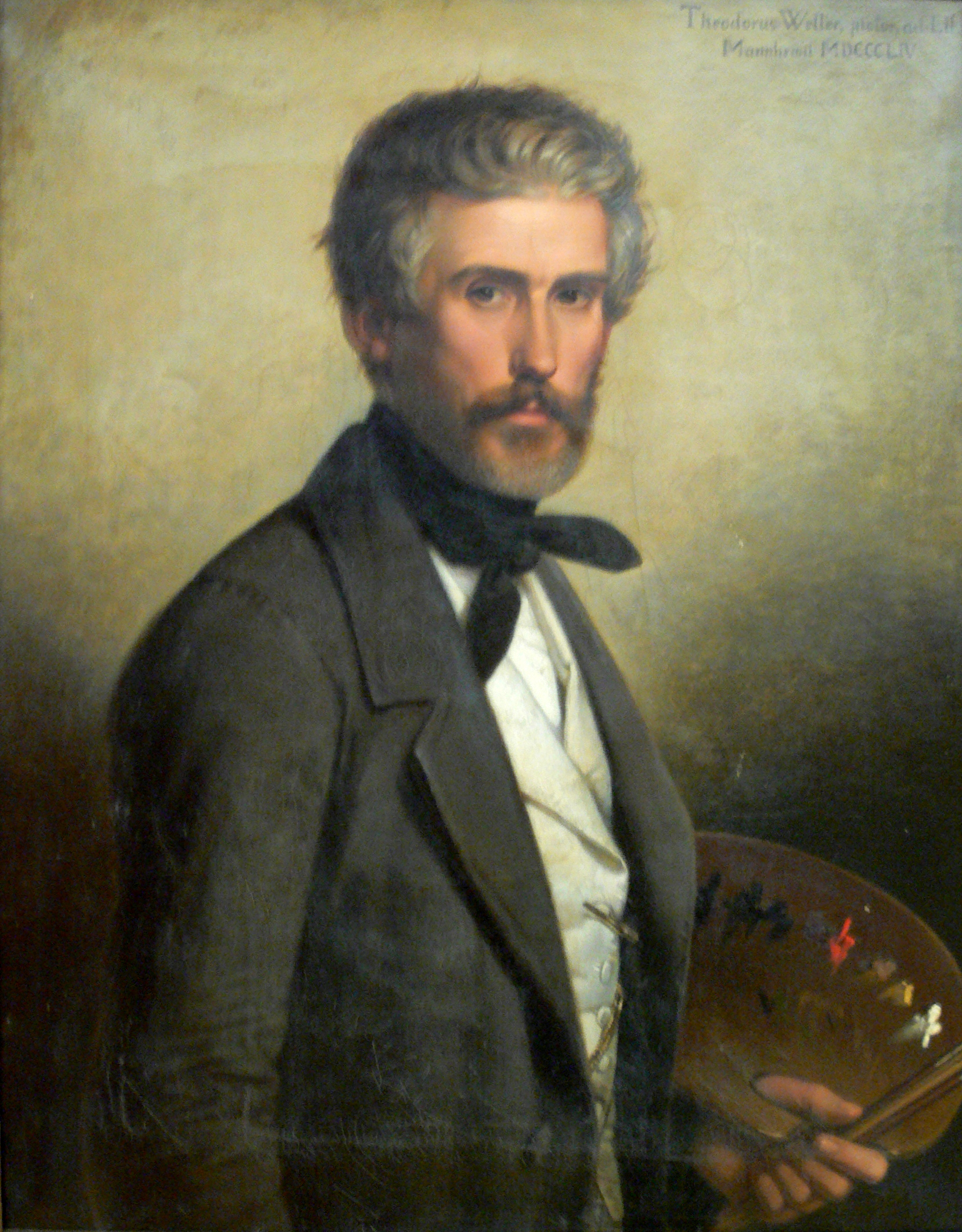 Selbstbildnis mit Pinseln und Palette